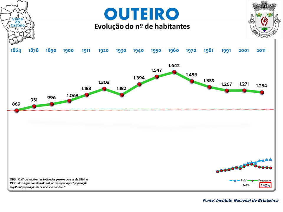 Censos 1864/2011